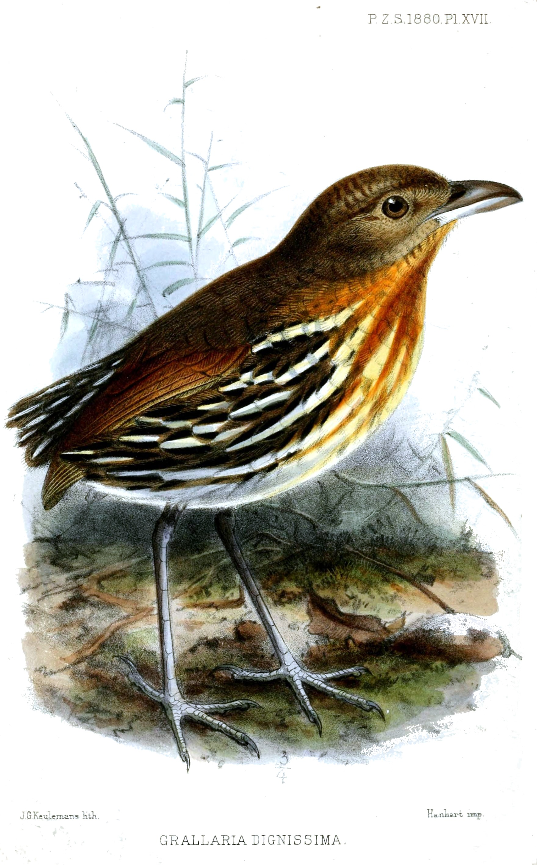 Grallaria dignissima